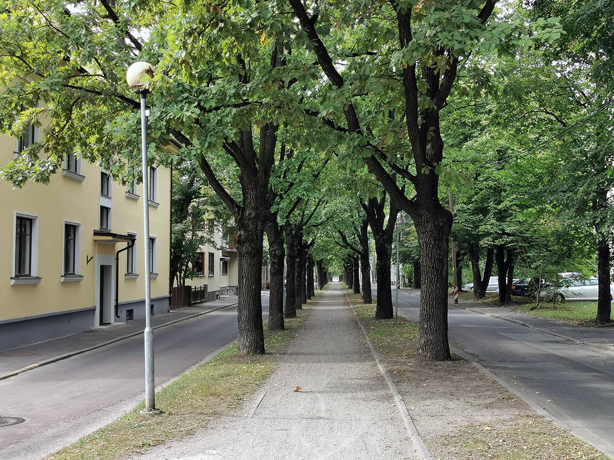 Taara puiestee Tartus aastal 2019